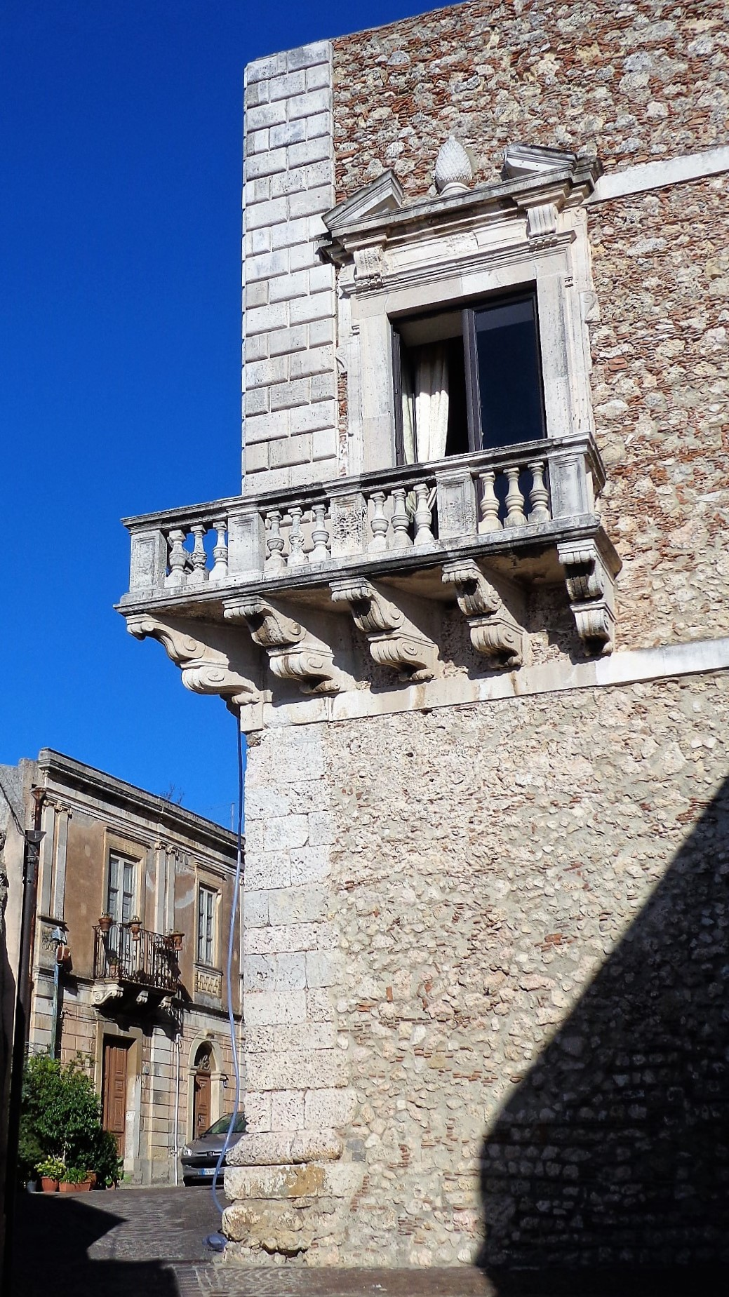 Balcone angolare sud - occidentale.